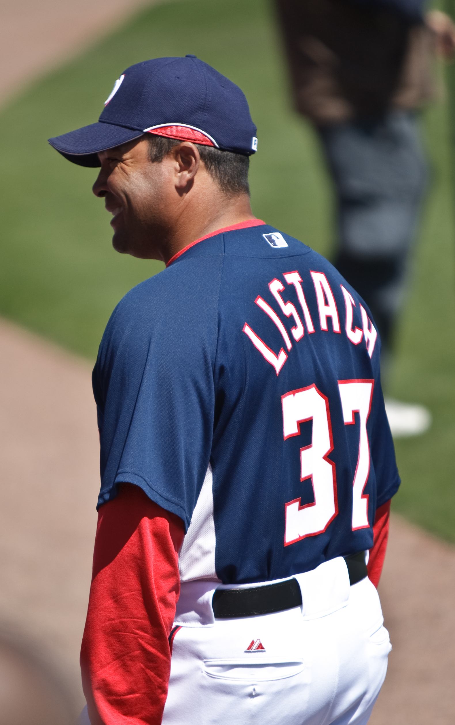 Pat Listach